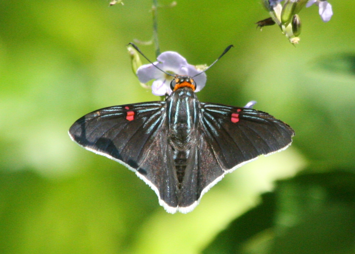 Guava skipper (Phocides polybius)